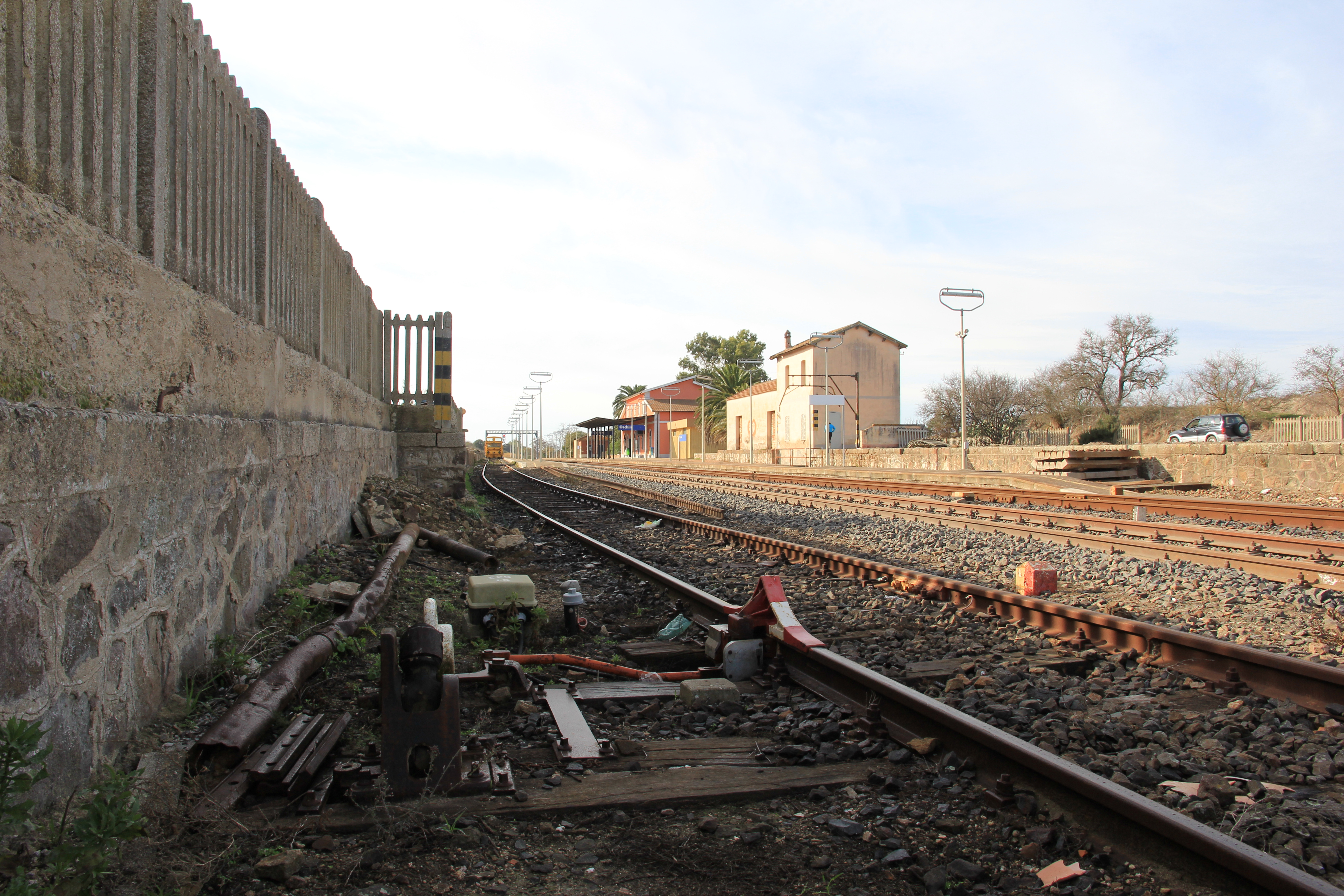 Oschiri - Stazione ferroviaria